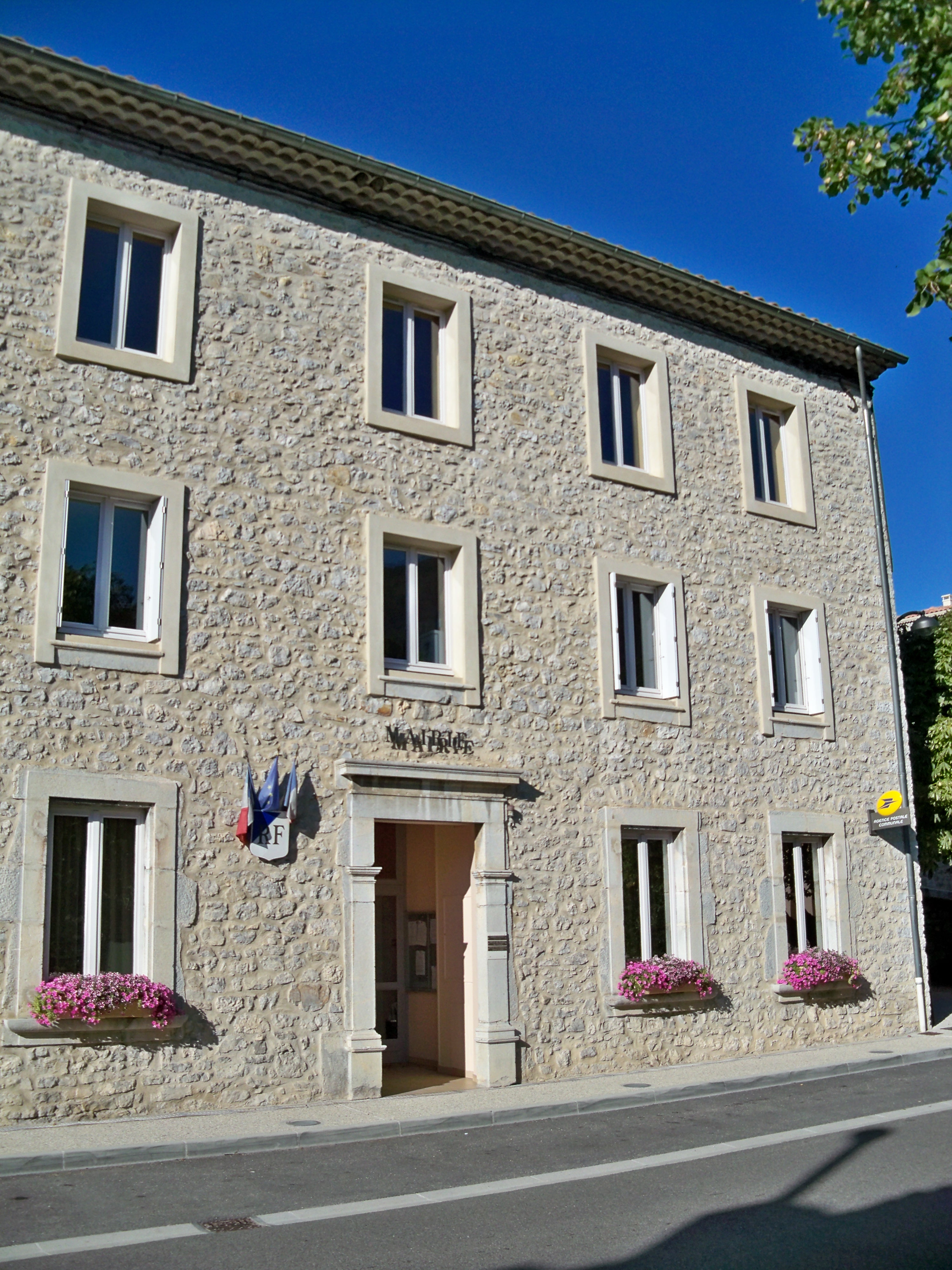 Mairie de Sahune (26)